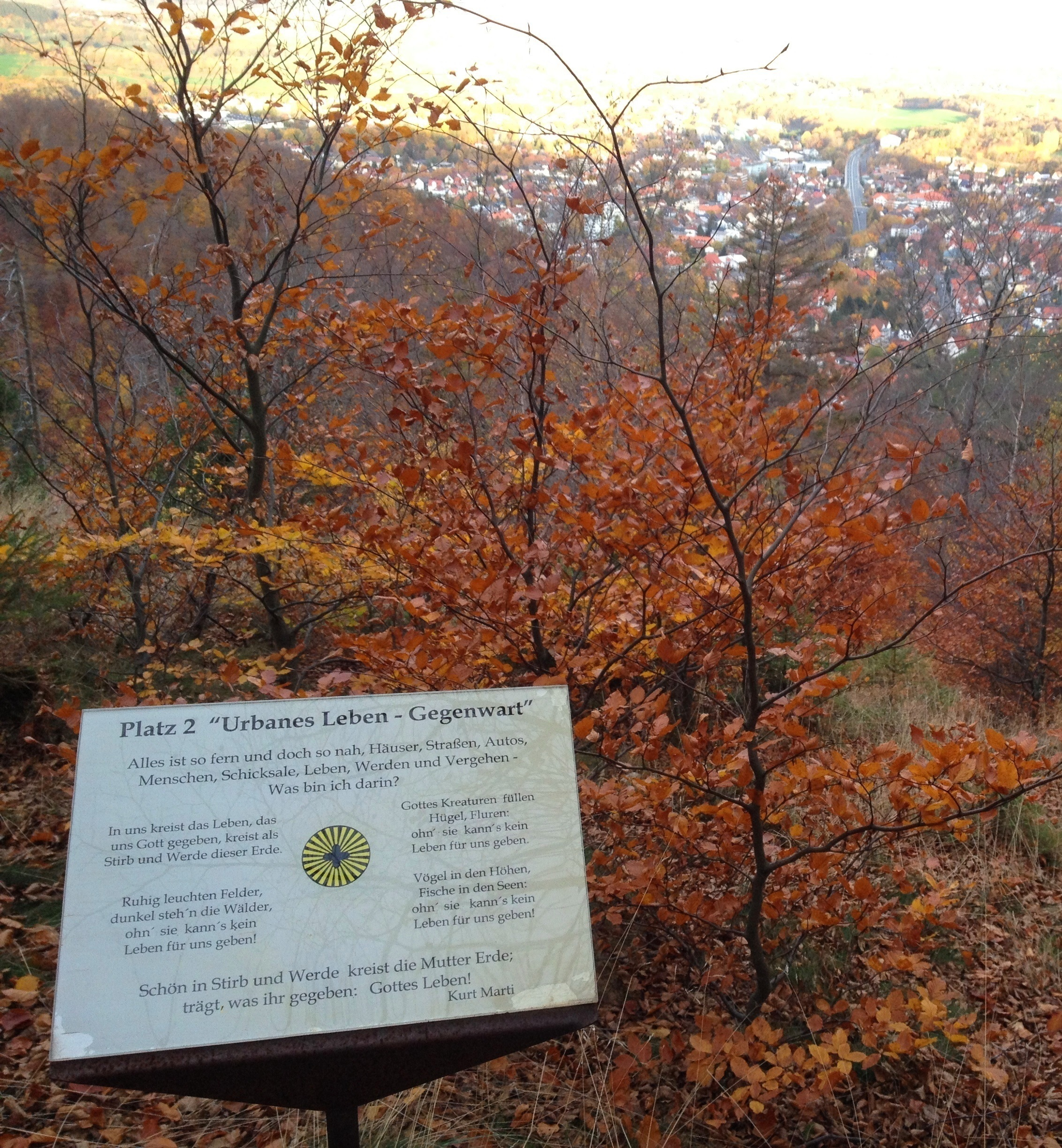 Bad Harzburg, Großer Burgberg, Besinnungsweg: Station 2, Blick auf die Stadt, Text von Kurt Marti: In uns kreist das Leben.